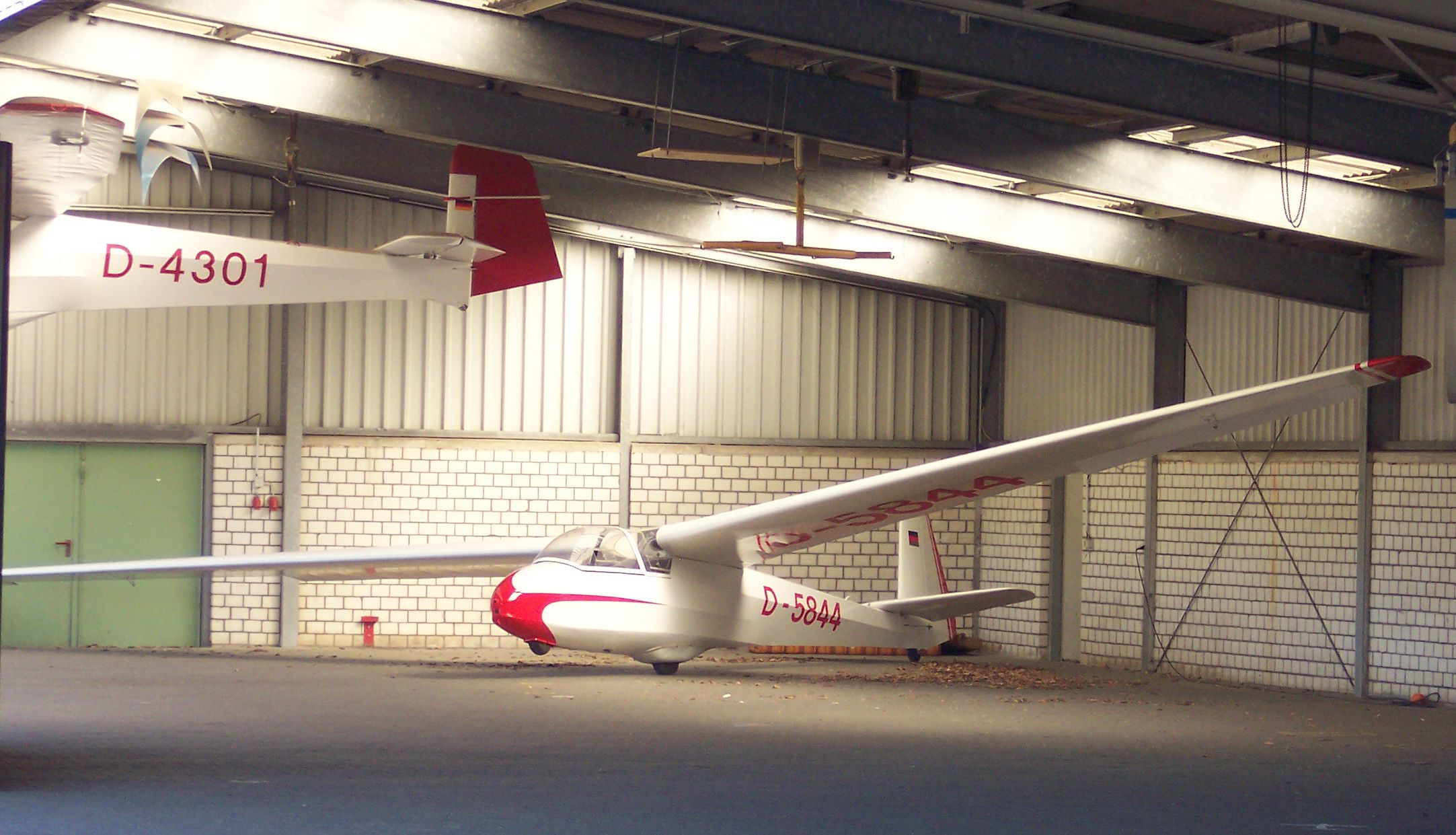 Schleicher K 7